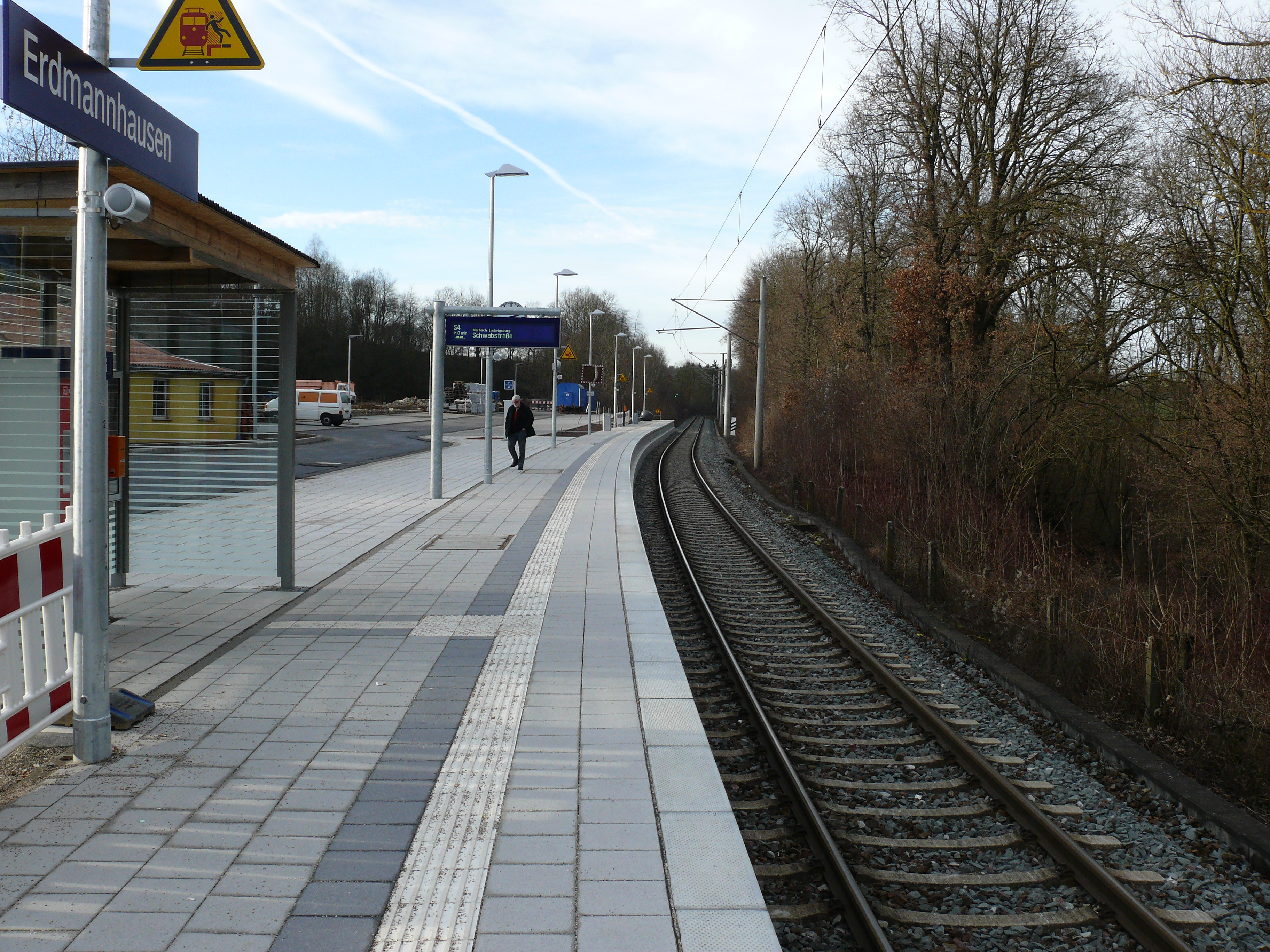 Die S-Bahnhaltestelle Erdmannhausen.